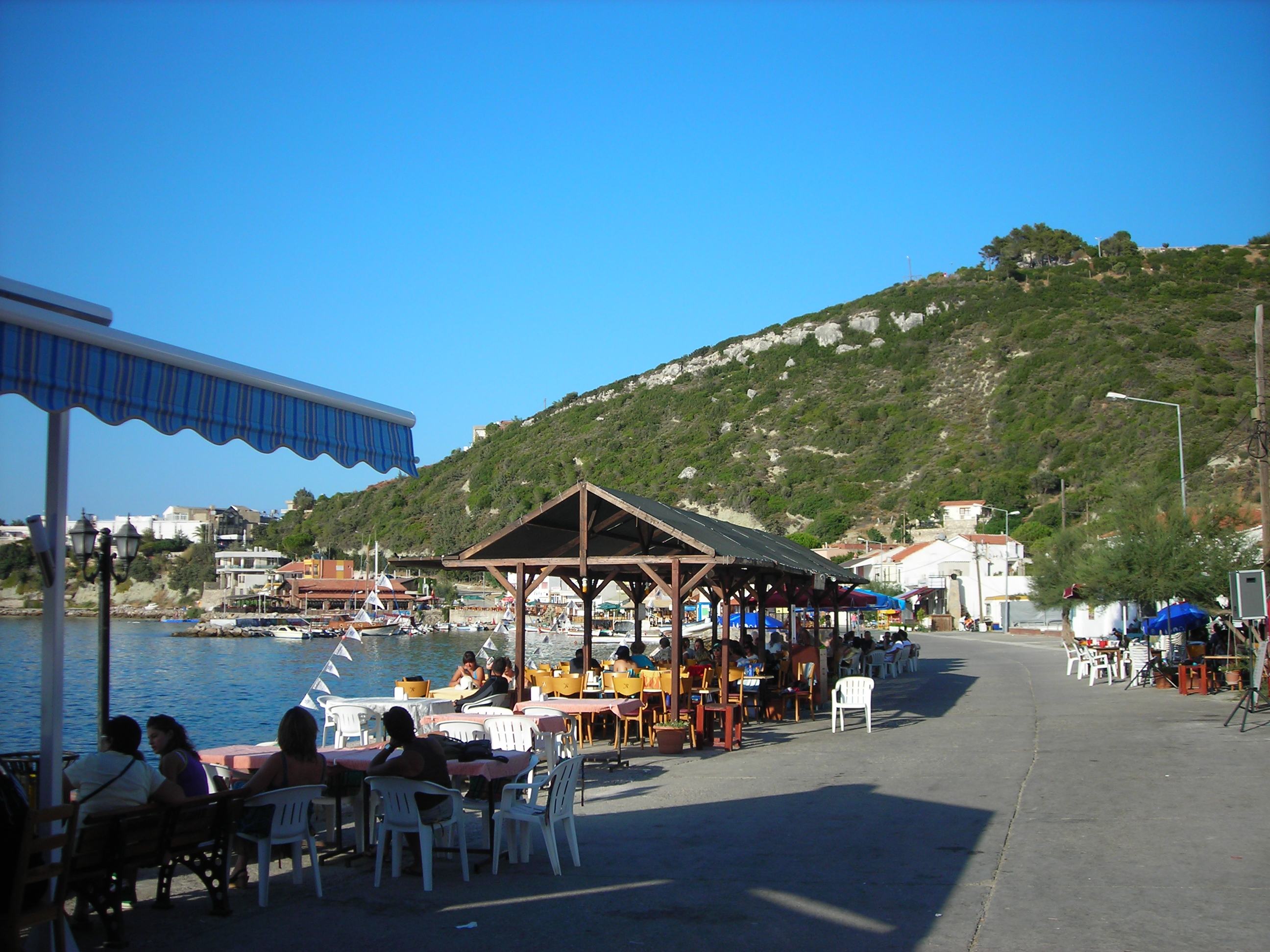 Karaburun iskelesi